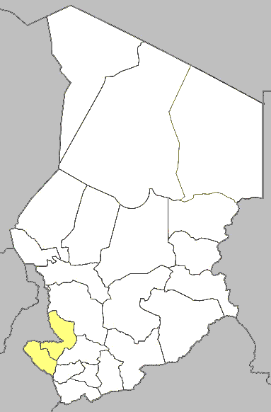 Mappa della diocesi di Pala, in Ciad.